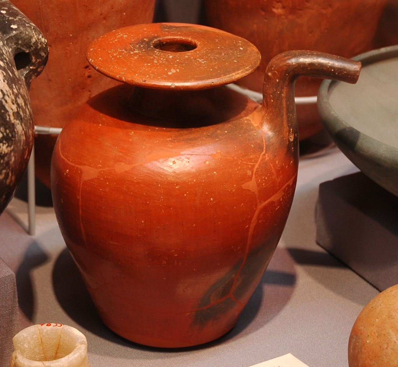 Altägyptische Keramik. Wasserkanne aus Turah, ca. 2900 v. Chr., Kunsthistorisches Museum Wien, Inv.-Nr. 6743, Keramik, poliert Gefäß mit Ausguß, aus feinem Ton hart gebacken. Dunkelrot, tadellos poliert; der Schaft des Ausgusses dagegen schwarz. Die Seitenwände ganz dünn, der breite Rand massiv. Junker Sondertyp 1 Siehe: Hermann Junker, I. Bericht über die Grabungen der Kaiserl. Akademie der Wissenschaften in Wien auf dem Friedhof in Turah, Wien 1912, S. 43 und S. 44 Abb. 50